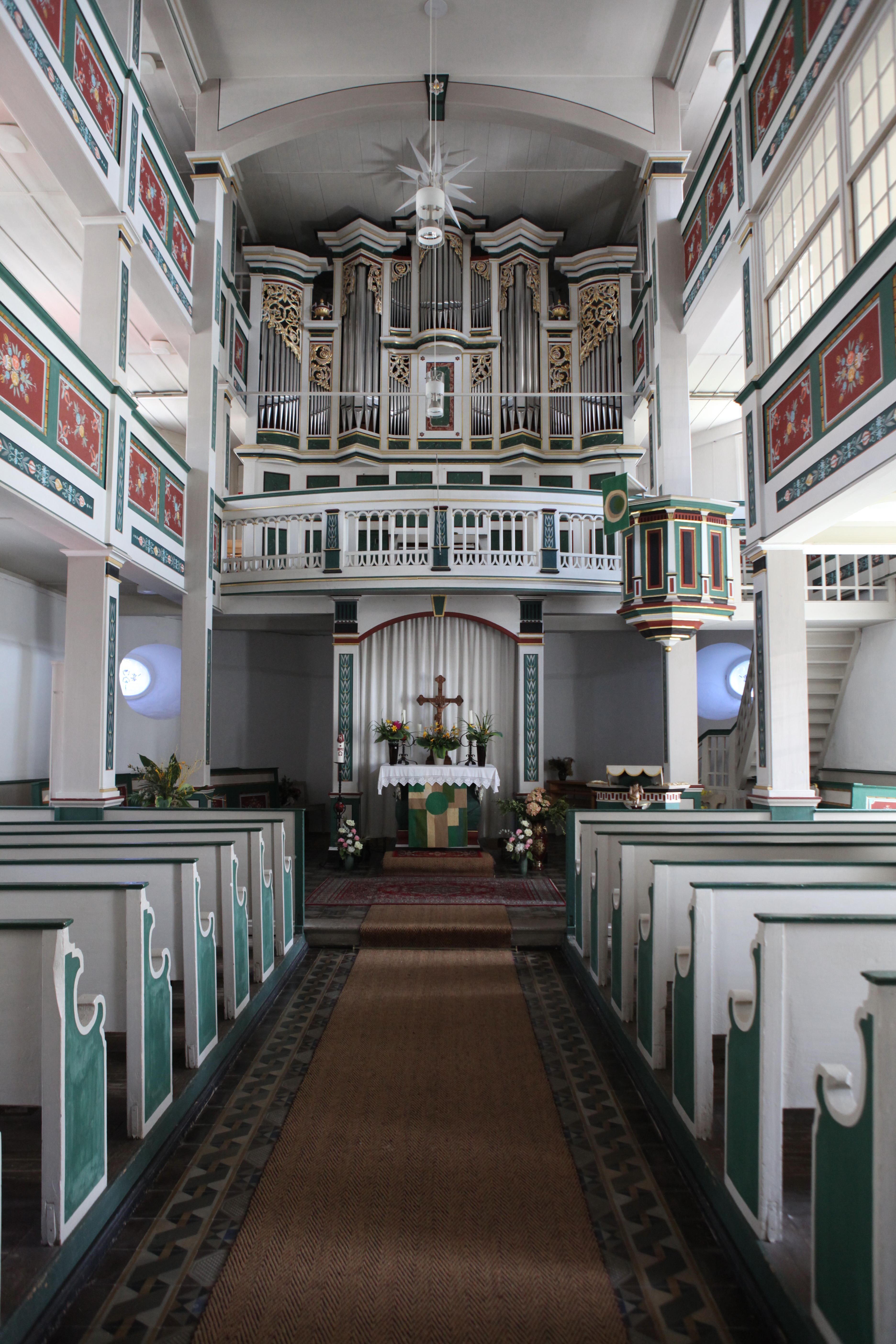 Ev. Kirche in Schett, OT von Masserberg